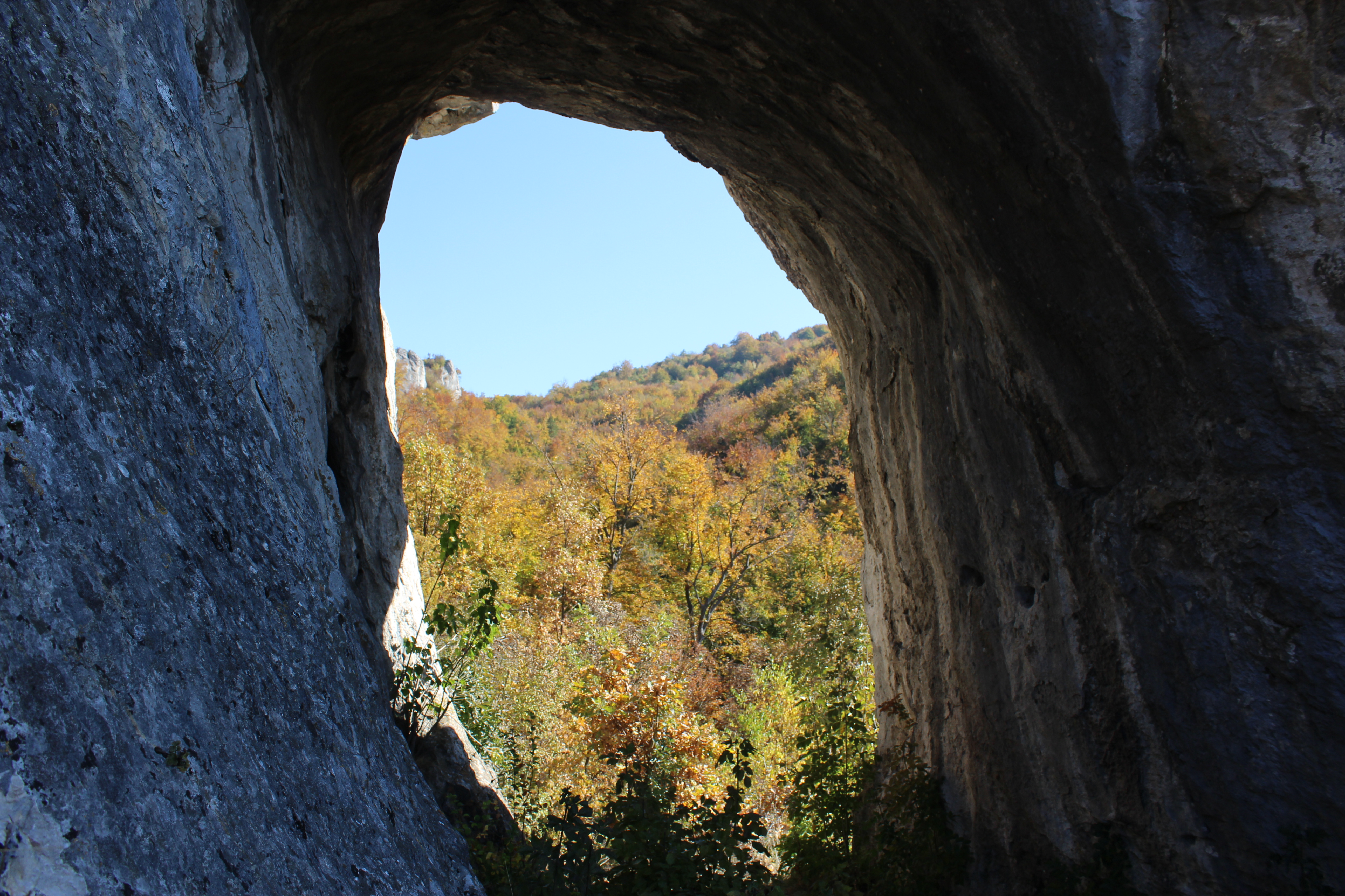 Srpski (latinica): Krečnjački prozorac Bogova vrata.